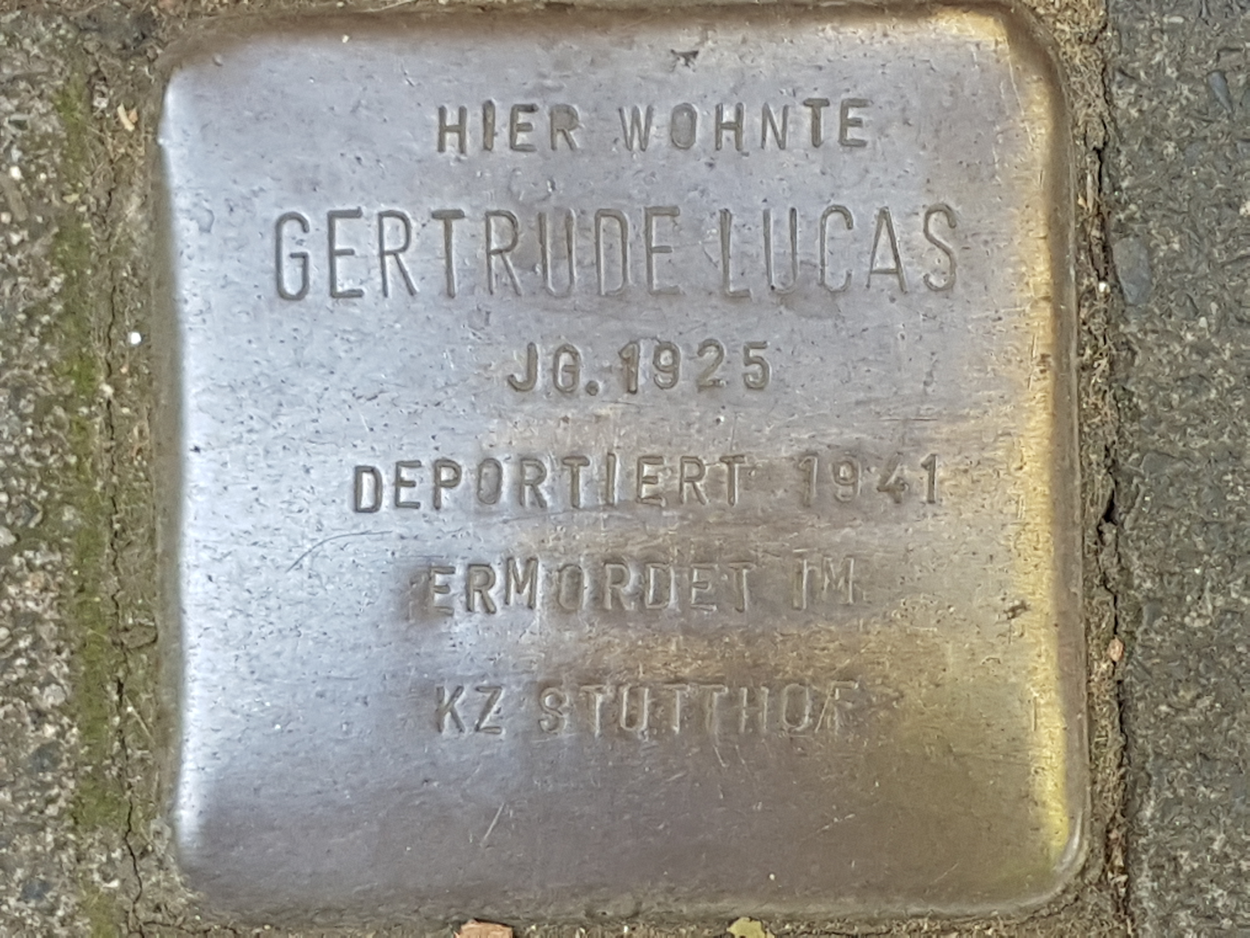 Stolperstein Duisburg